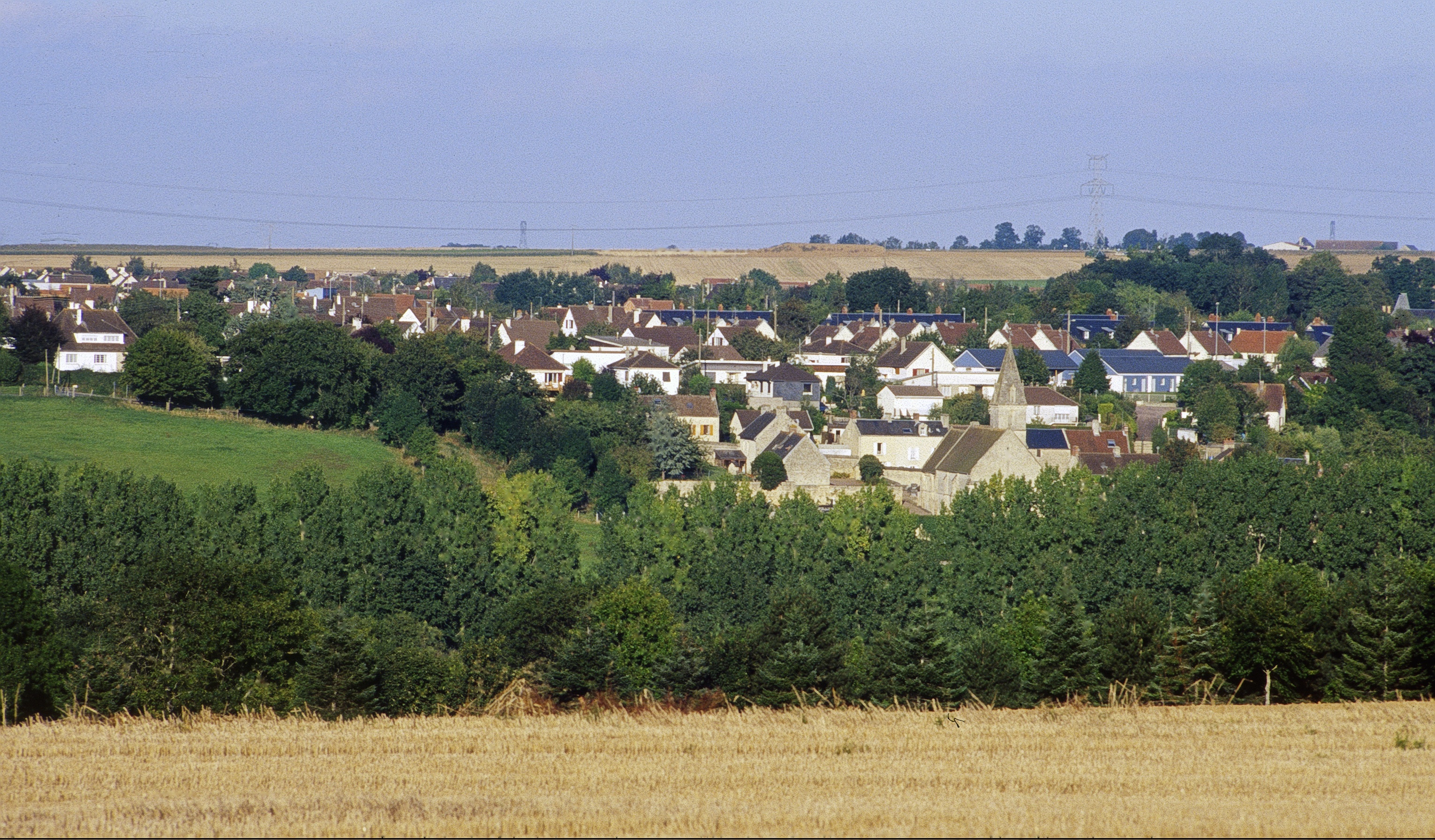 Village of Saint André-sur-Orne